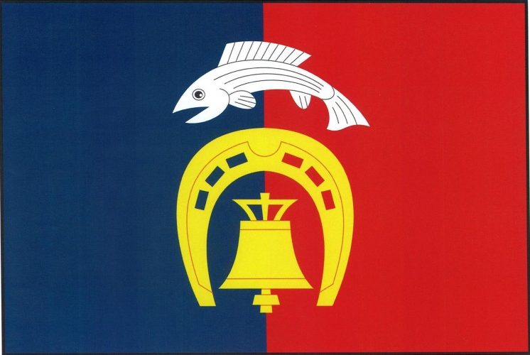 vlajka, Cekov, okres Rokycany